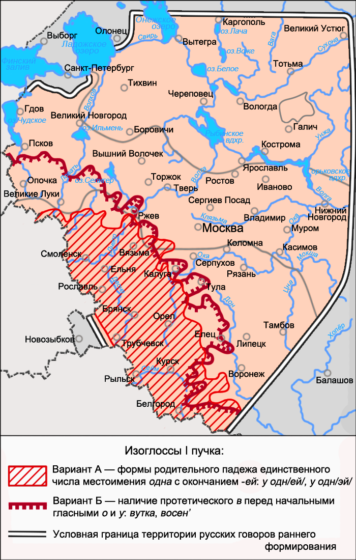 Карта I пучка юго-западной диалектной зоны русского языка. Источники: Захарова К. Ф., Орлова В. Г. Диалектное членение русского языка — 2-е изд. — М.: Едиториал УРСС, 2004. — ISBN 5-354-00917-0, с. 97. Язык русской деревни. Диалектологический атлас. — Наречия и диалектные зоны. Бромлей С. В., Булатова Л. Н., Захарова К. Ф. и др. Русская диалектология / Под ред. Л. Л. Касаткина — 2-е изд., перераб. — М.: Просвещение, 1989. — ISBN 5-09-000870-1, с. 205